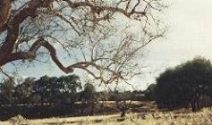 Santa Cruz River, Arizona